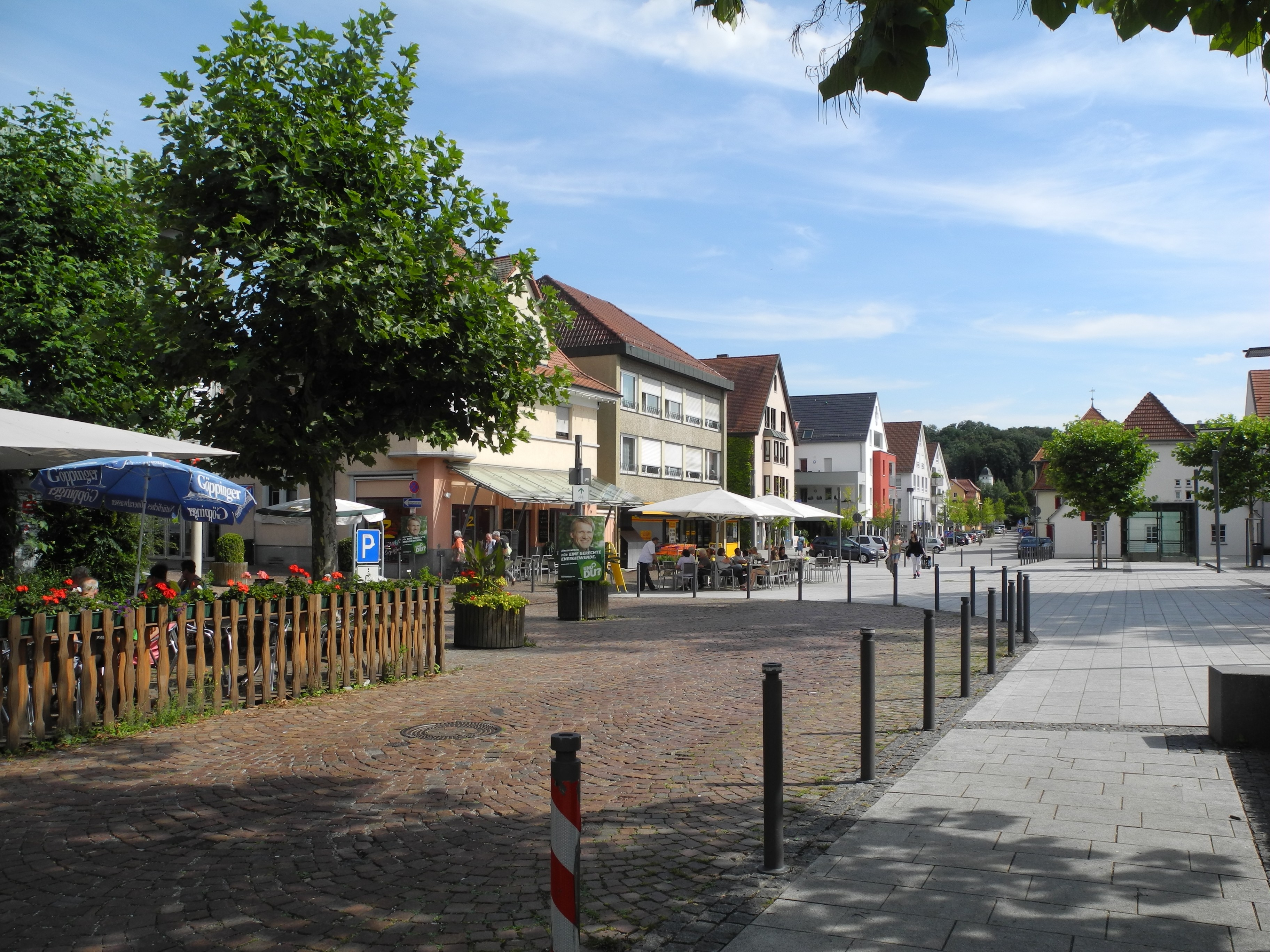 Reichenbach Fils - Ortsmitte beim Rathaus